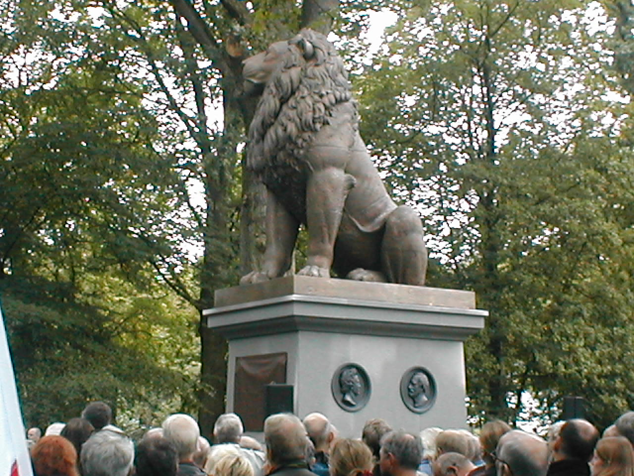 Kunstwerk eines Löwen alsErinnerung an die Schlacht bei Isted (Dänen vs. Deutsche)